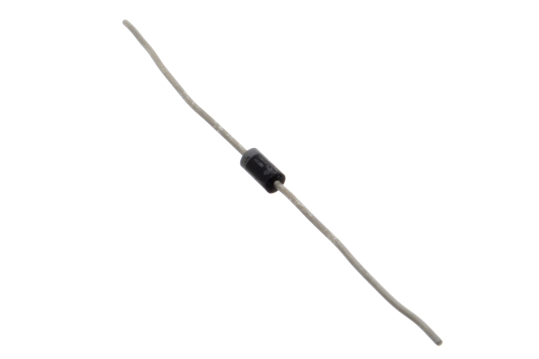 1N4001 diode.